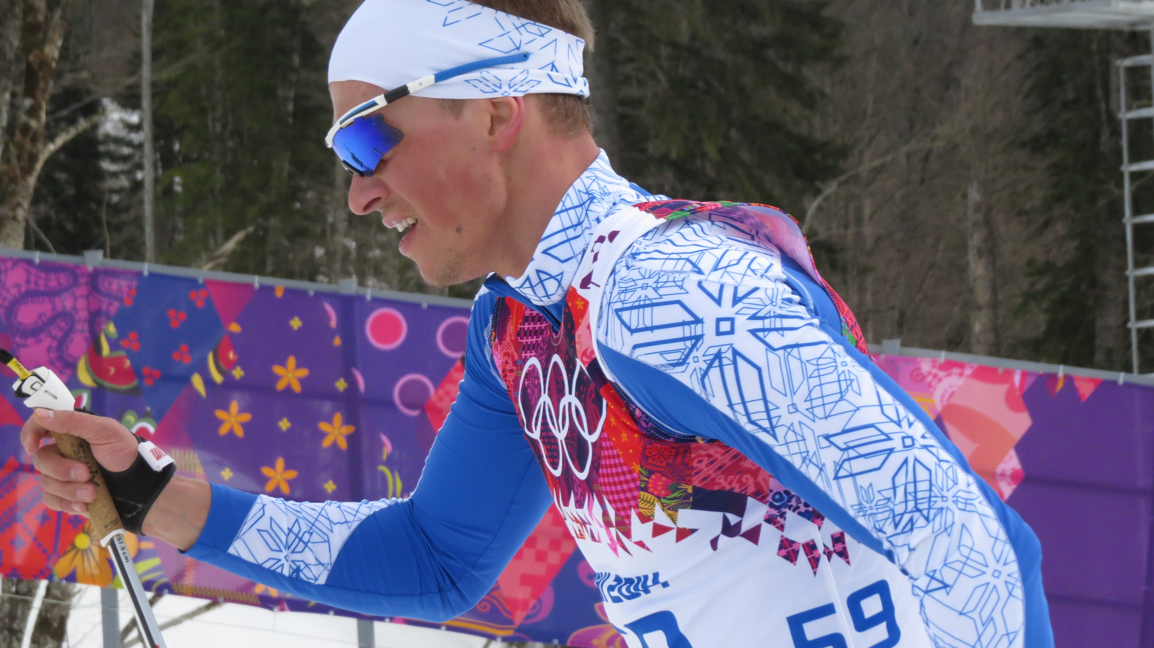 Лыжные гонки на зимних Олимпийских играх 2014 — 15 км классическим стилем (мужчины)